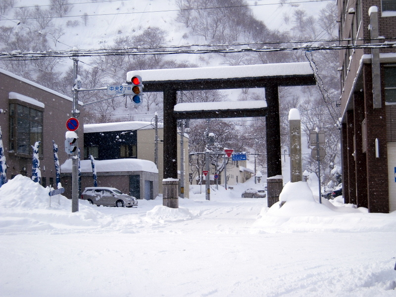 稚内市 北門神社の鳥居